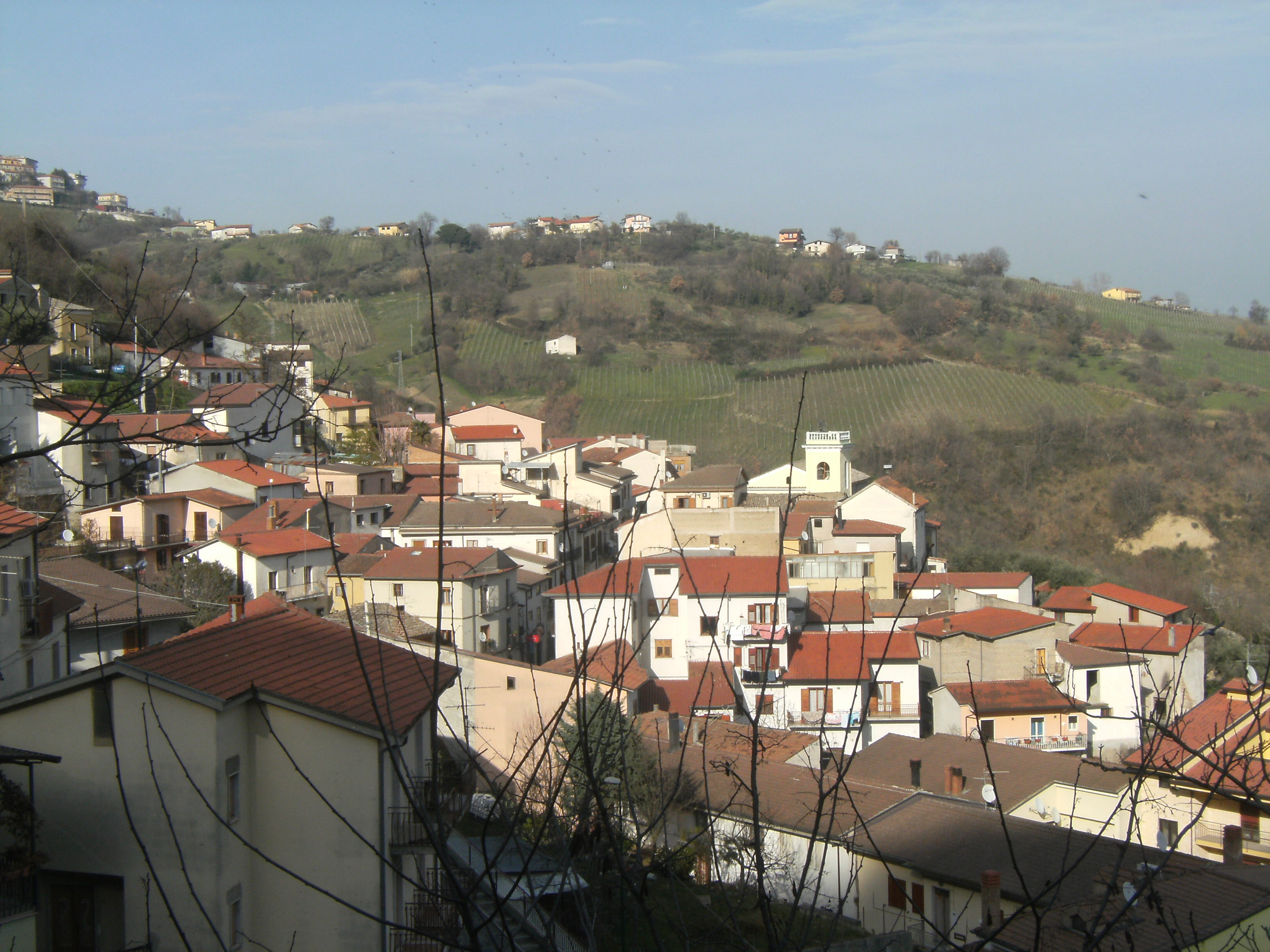 Santa Paolina (Avellino) - Italia